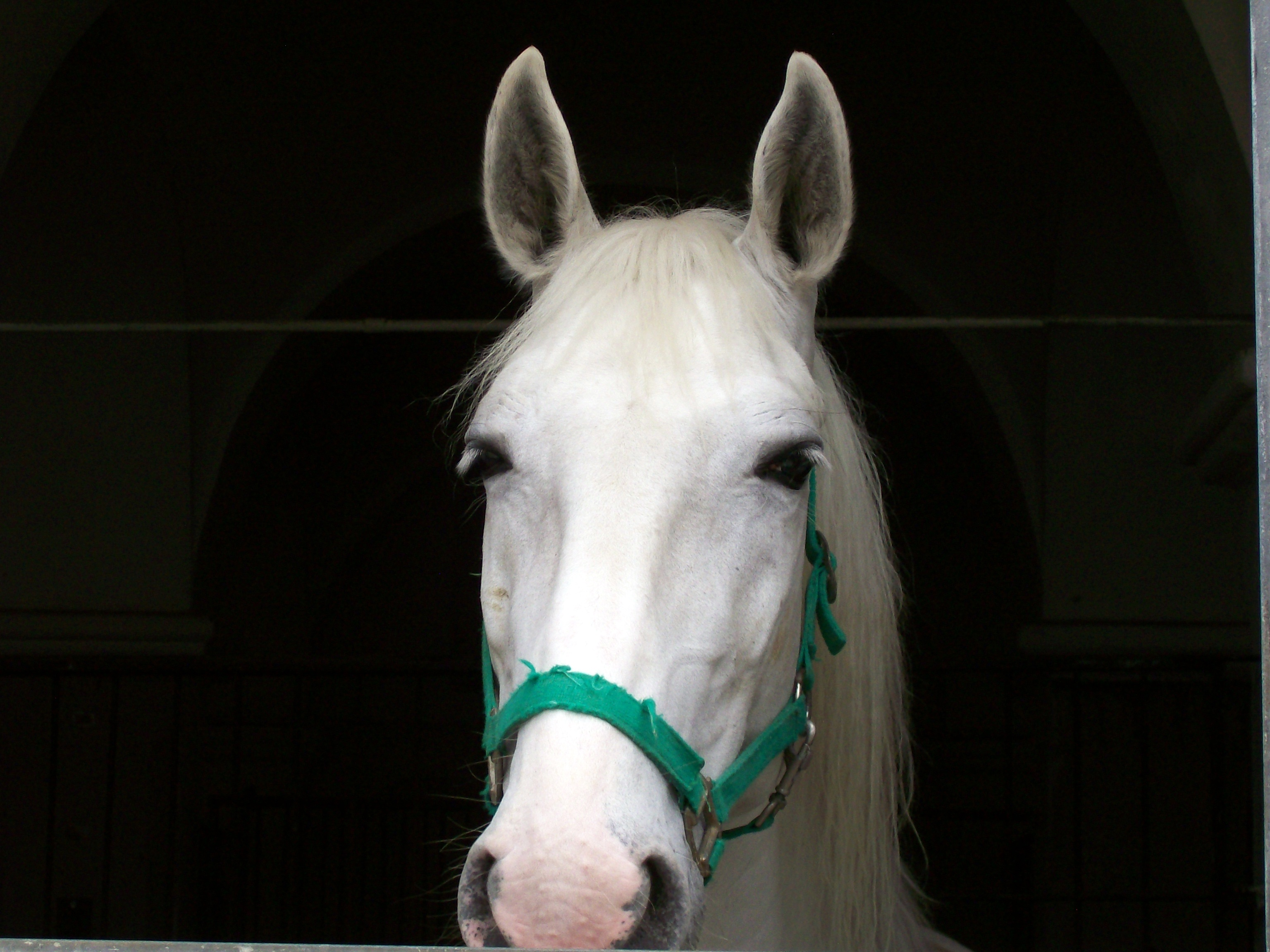 Kladruber